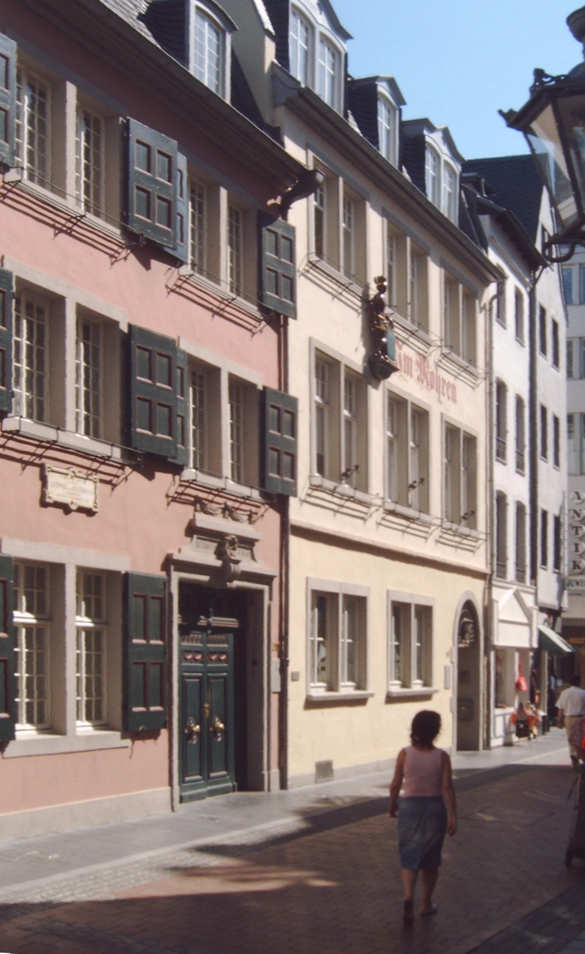 Beethovens Geburtshaus in der Bonngasse – daneben das Haus „Im Mohren“ (heute ist dort der Shop des Beethoven-Haus und das Digitale Archiv untergebracht)